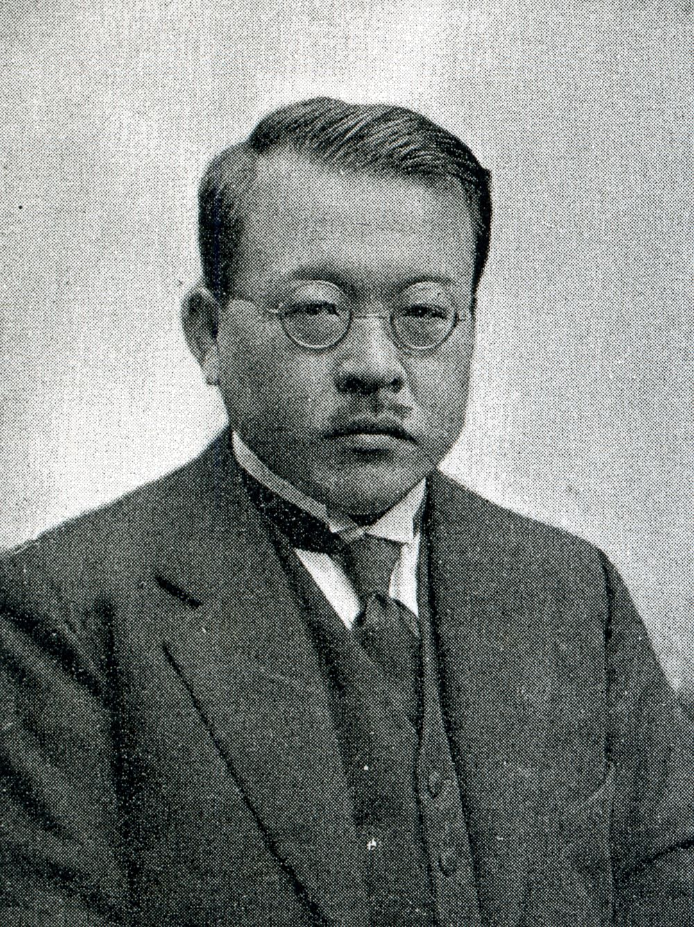 この写真は、中島弥団次（1886-1962）の写真です。